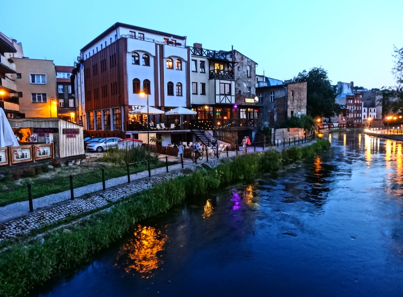 Wenecja Bydgoska – zespół architektoniczny Starego Miasta w Bydgoszczy zbudowany bezpośrednio nad rzeką Młynówką (zbud. 1870-1900).